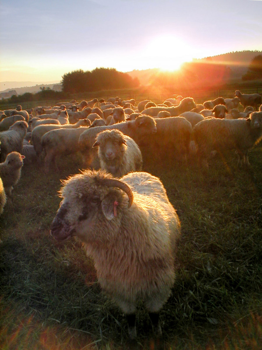 Wypas owiec w Witowie k. Zakopanego.